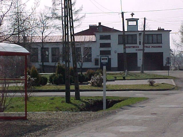 Budynek OSP w Zaborzu, pow. cieszyński